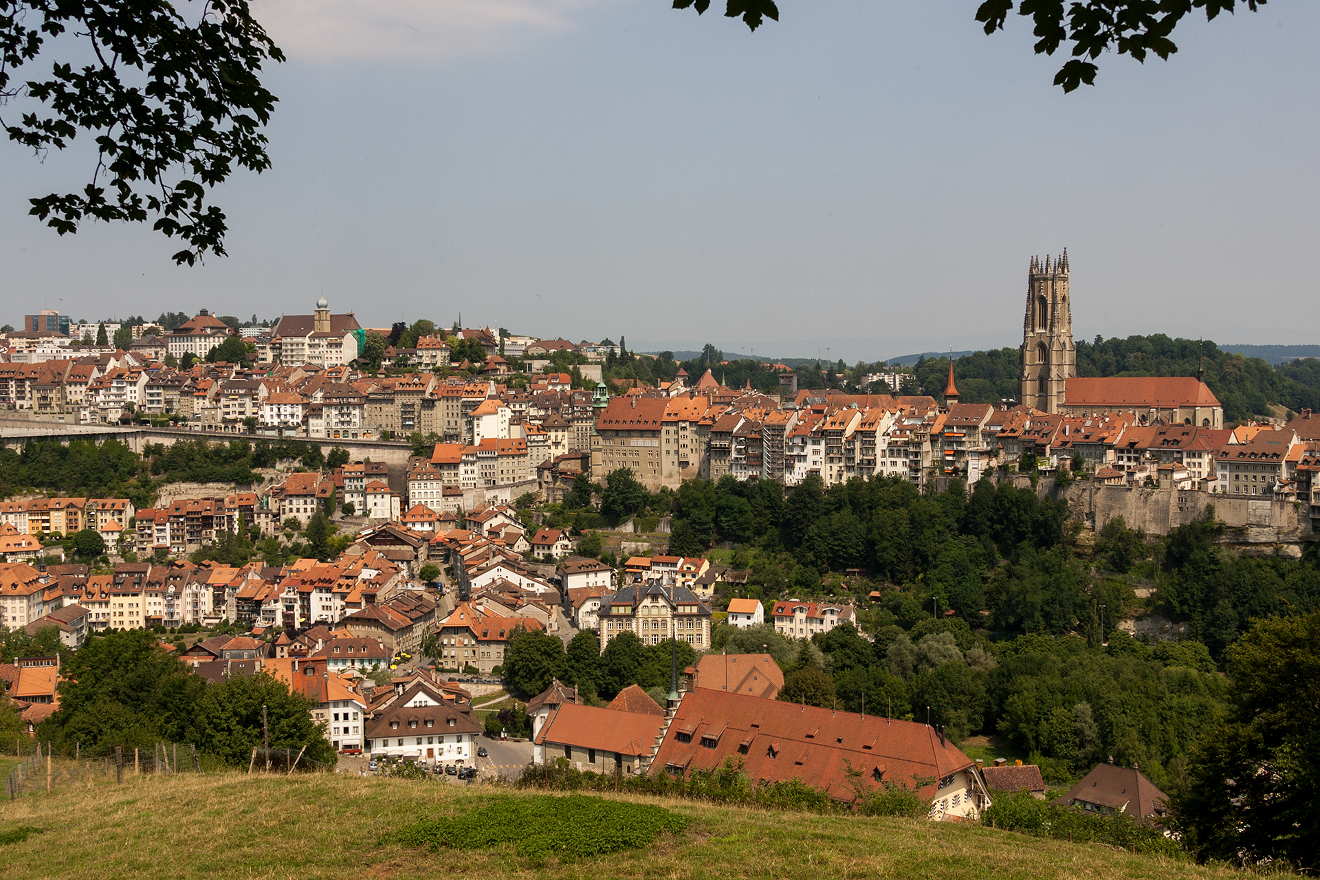 Blick auf Fribourg